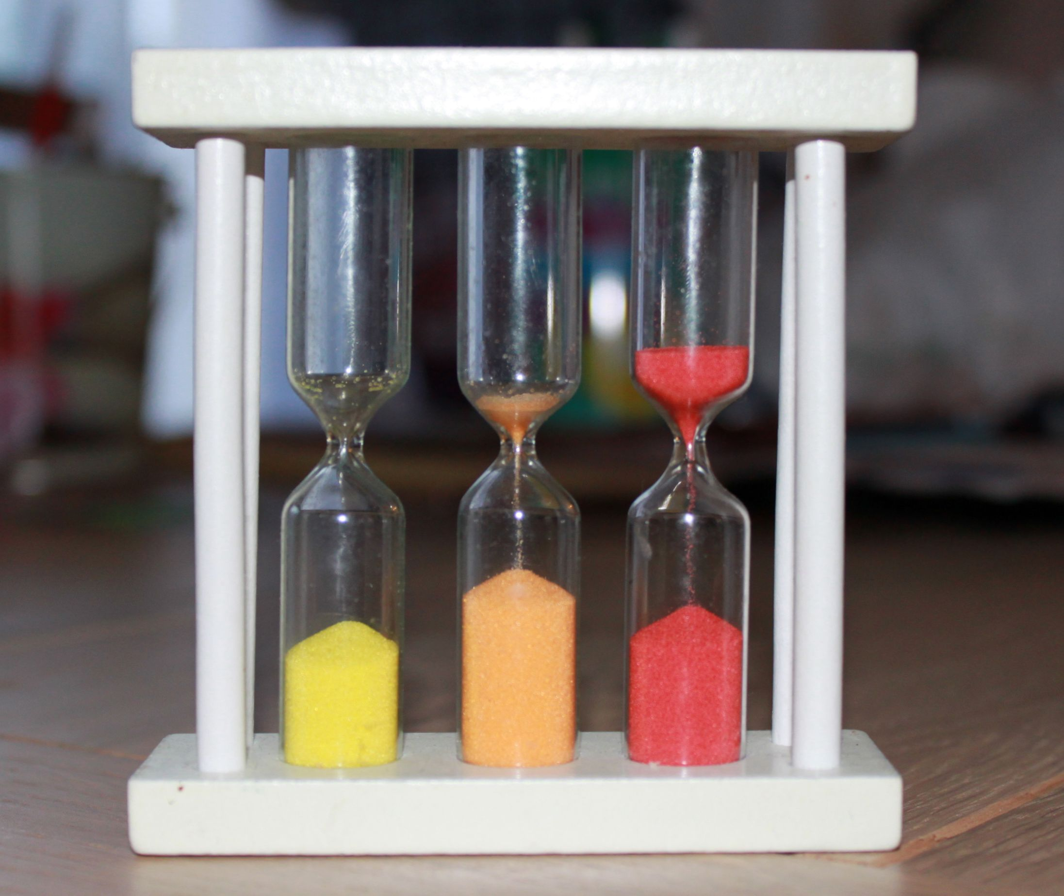 Sablier